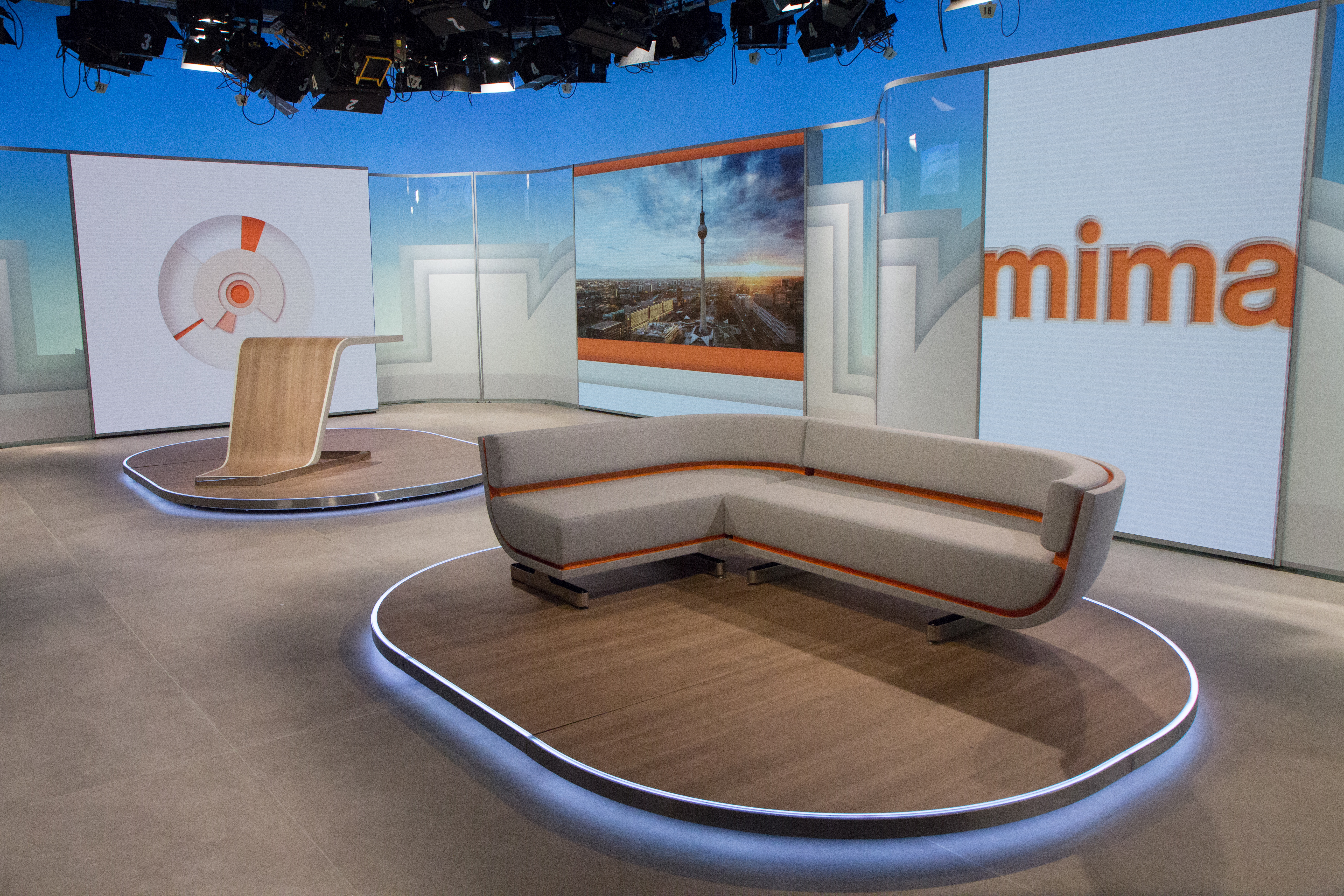 Pressetermin des ZDF zum ZDF-Mittagsmagazin in der neuen Studiokulisse mit ZDF-Chefredakteur Peter Frey, Andreas Wunn, Leiter der neuen ZDF-Redaktion Tagesmagazine Berlin sowie der neuen "ZDF-Mittagsmagazin"-Moderatorin Jana Pareigis.